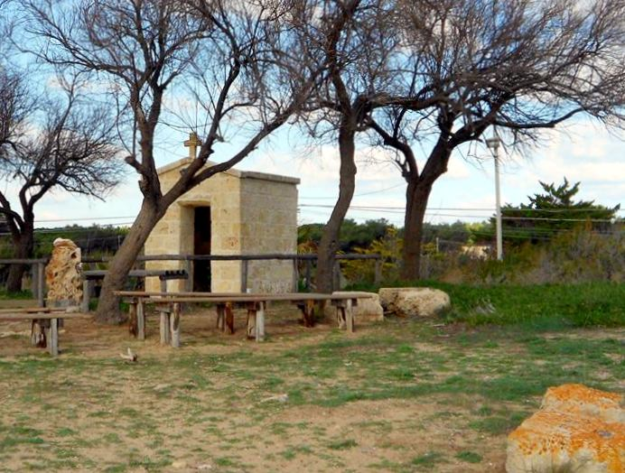 La Cappella della Madonna dell'Altomare in località Capoccia Scorcialupi coi blocchi tufacei di epoca magnogreca